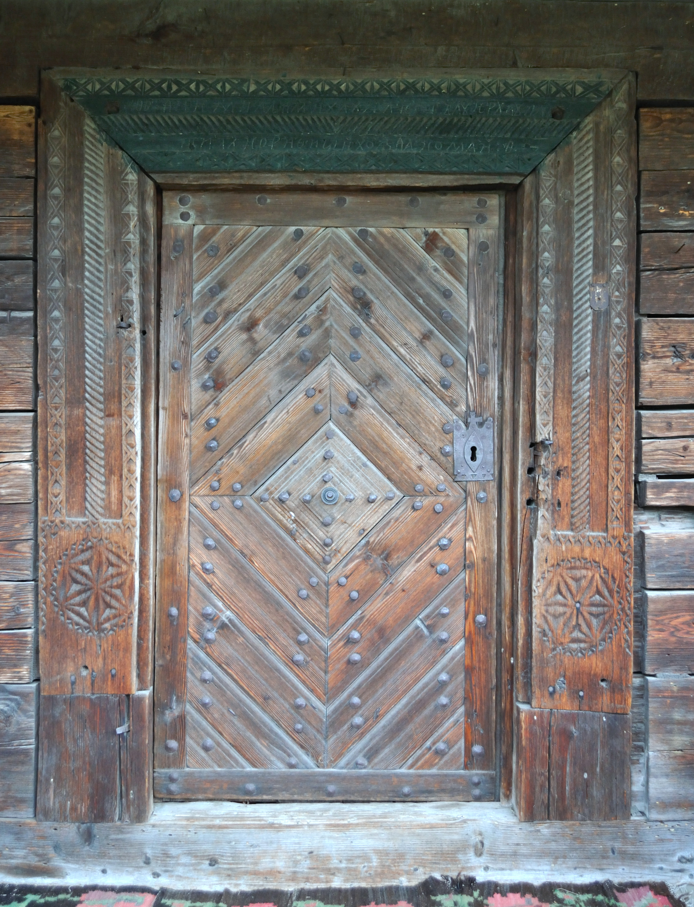 Biserica de lemn ucraineană din Ruscova